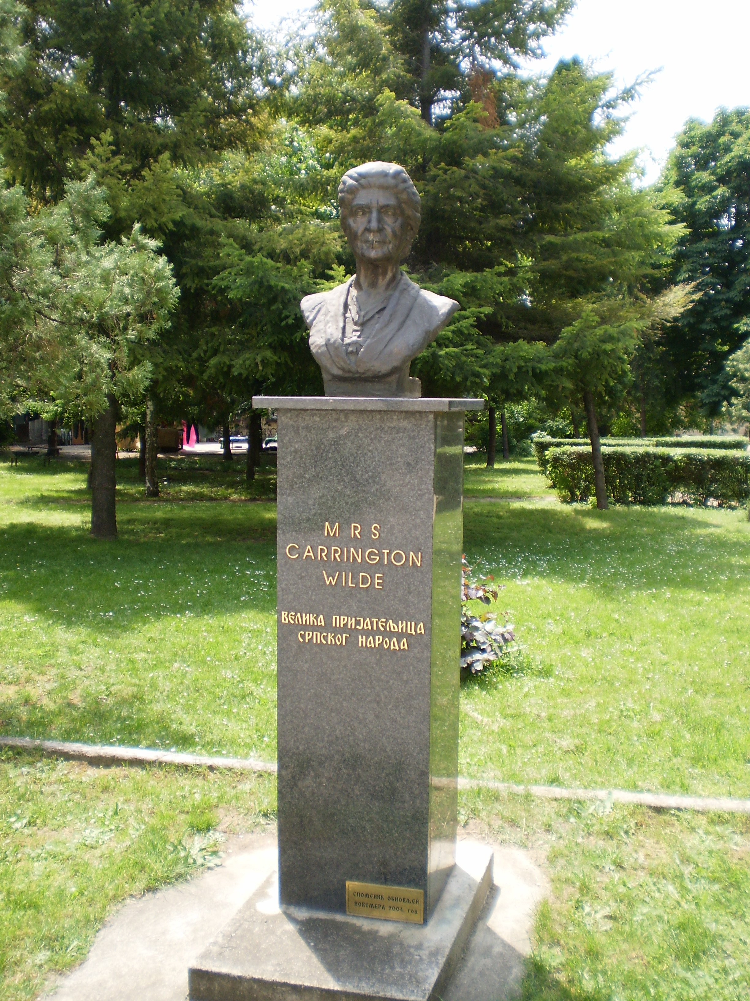 Srpski (latinica): Bista Carrington Wilde koja je, na inicijativu Nišlija, otkrivena ispred Englesko-srpski doma.